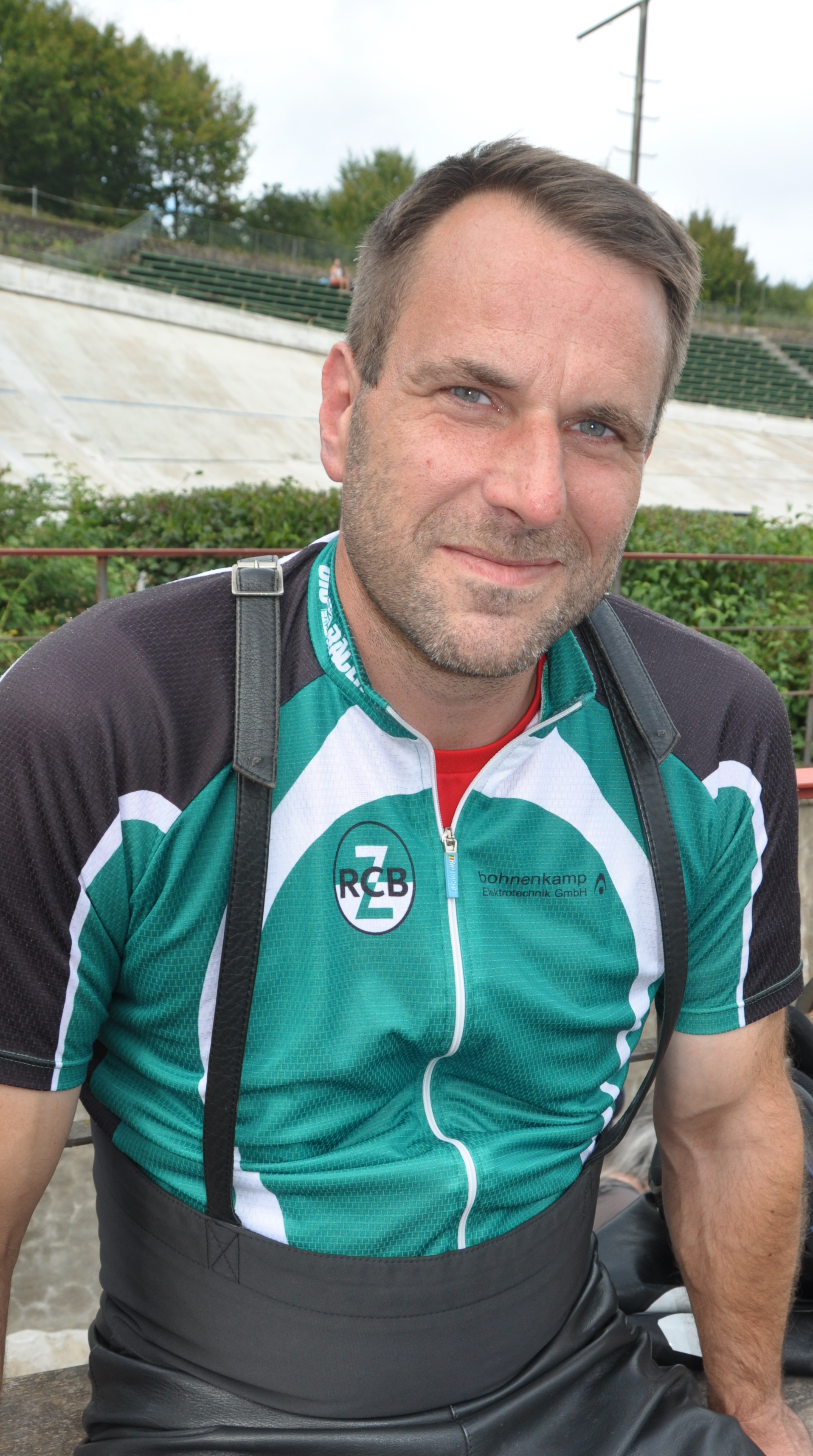 Tag des Offenen Denkmals auf der Radrennbahn in Bielefeld, André Dippel - Schrittmacher